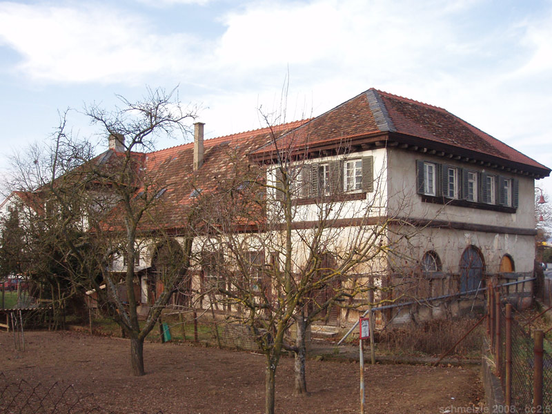 Salzmagazin von 1780 in Offenau